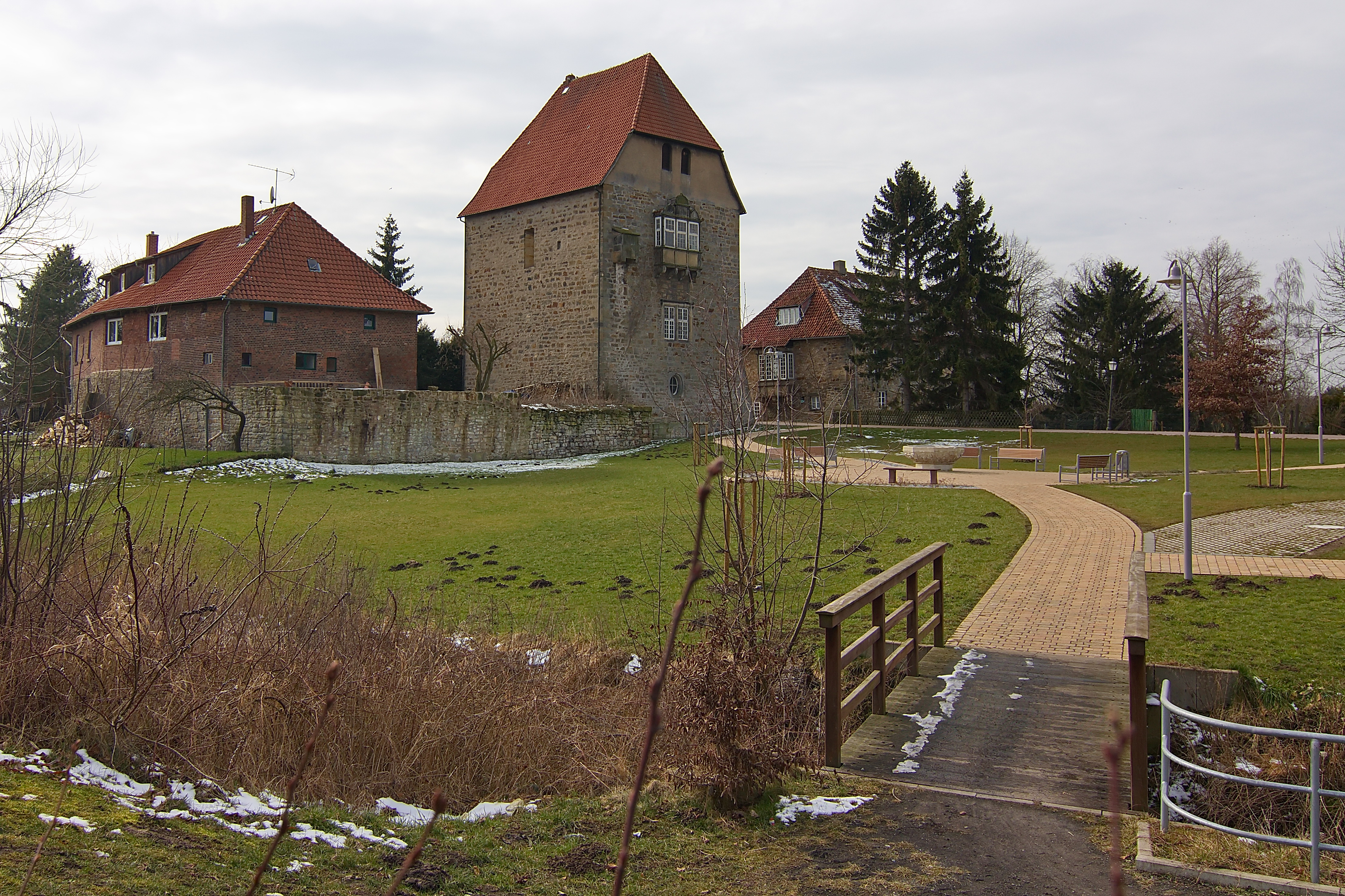 Wasserburg Sachsenhagen von 1250 in Sachsenhagen, Niedersachsen, Deutschland